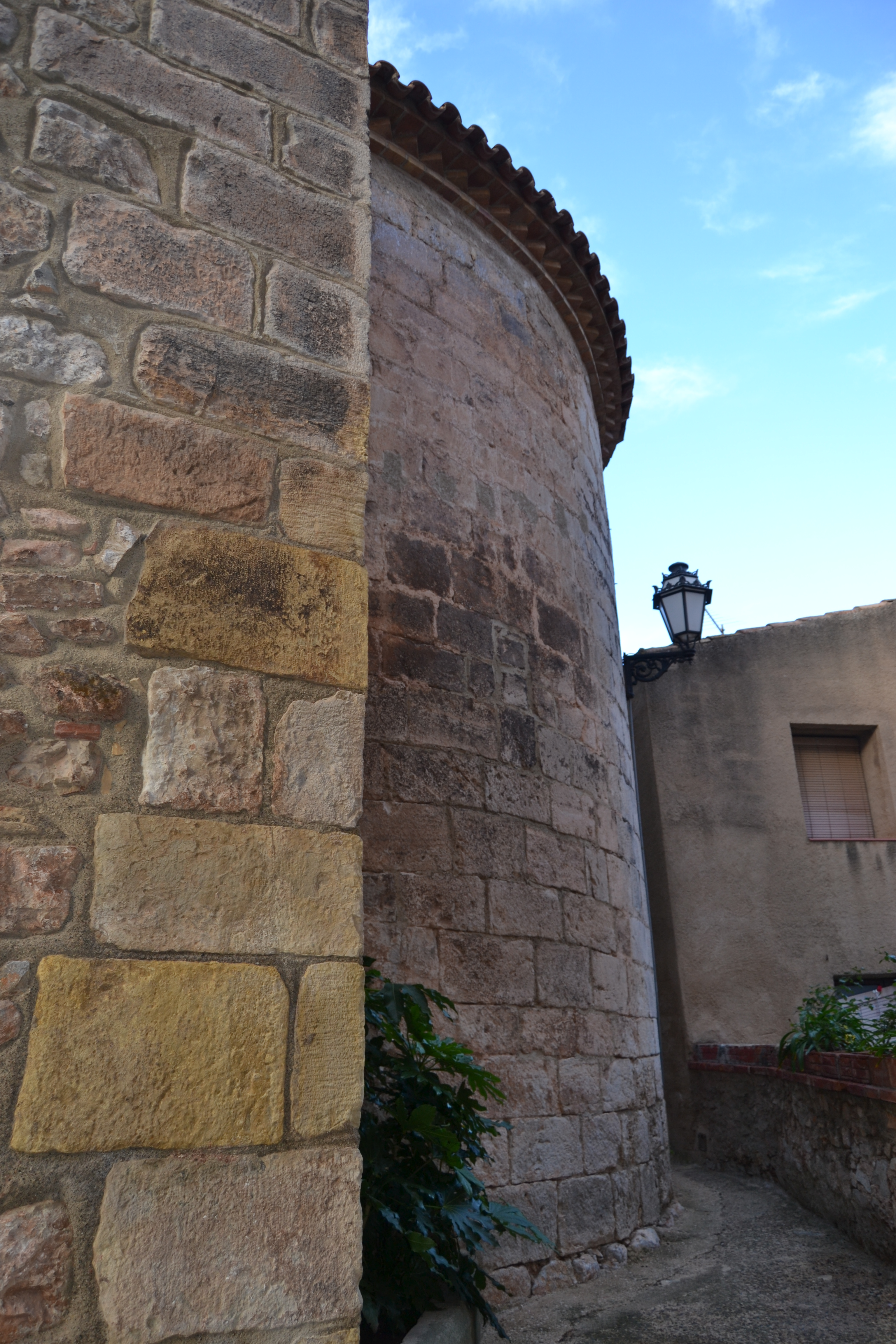 Església parroquial del Natalici de la Mare de Déu (Pratdip)